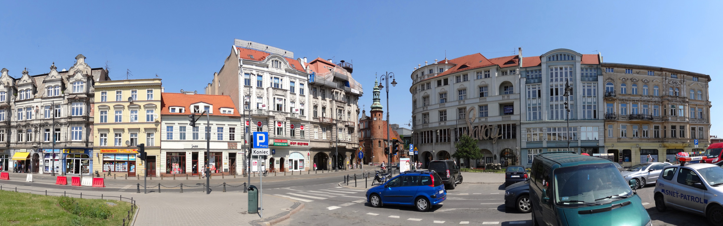 Plac Teatralny w Bydgoszczy